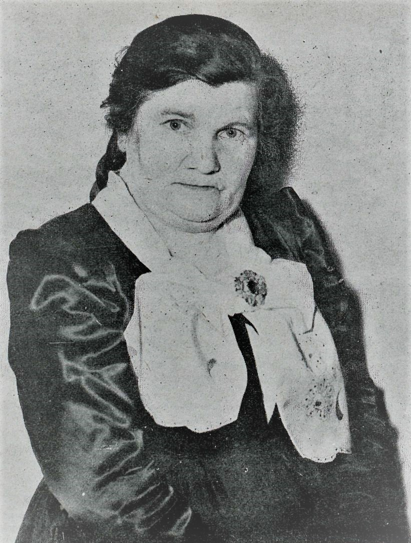 Guðrún frá Lundi í peysufötum.